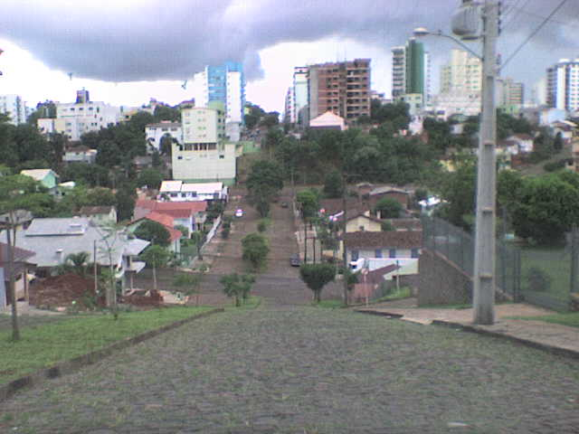 Vista do alto da Avenida Salgado Filho, Erechim.